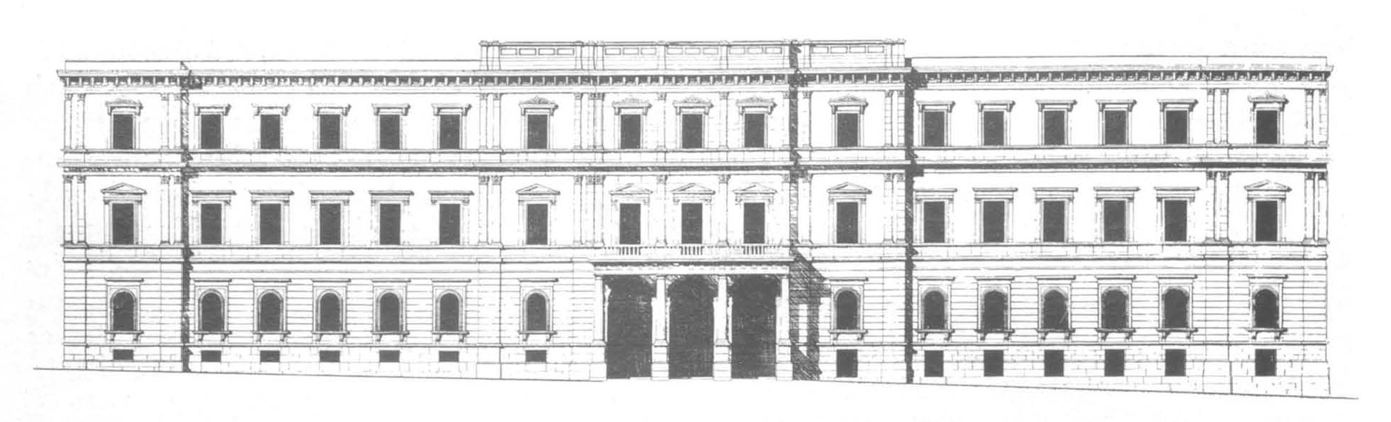 Kronprinzenpalais, Stuttgart, Aufriss, vor 1958.